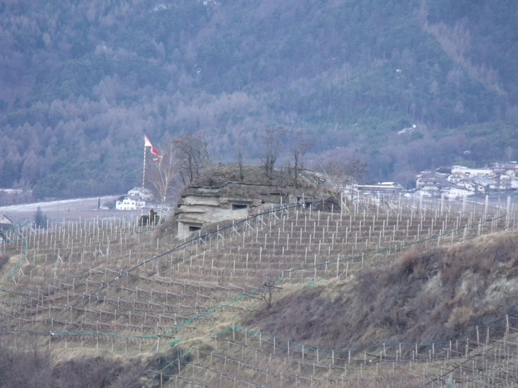 Opera 39 Bolzano